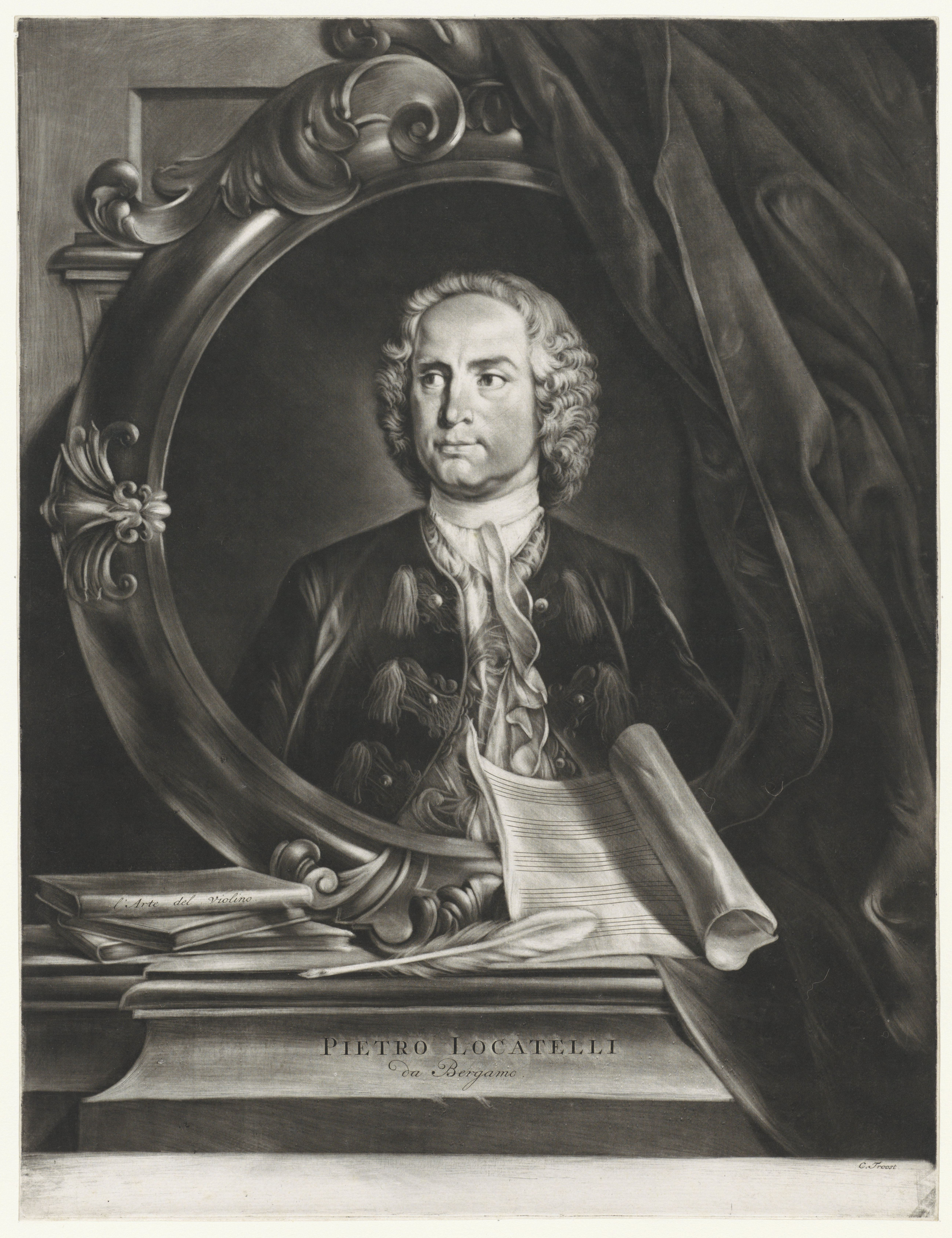 IdentificatieTitel(s): Portret van Pietro Antonio LocatelliObjecttype: prent Objectnummer: RP-P-1910-1512Catalogusreferentie: Niemeijer 61P-2(3)Opschriften / Merken: verzamelaarsmerk, verso, gestempeld: Lugt 2228Omschrijving: De Italiaanse componist en vioolleraar Pietro Antonio Locatelli. Voor de omlijsting een stapel boeken, een schrijfveer en een blad met lege notenbalken.VervaardigingVervaardiger: prentmaker: Cornelis Troost (vermeld op object)Plaats vervaardiging: AmsterdamDatering: 1729 - 1750Fysieke kenmerken: mezzotint en gravure; proefdrukMateriaal: papier Techniek: mezzotint / graveren (drukprocedé)Afmetingen: plaatrand: h 430 mm × b 330 mmOnderwerpWat: printed edition of musical scorequillportrait of composerWie: Pietro Antonio LocatelliVerwerving en rechtenVerwerving: aankoop 1910Copyright: Publiek domein